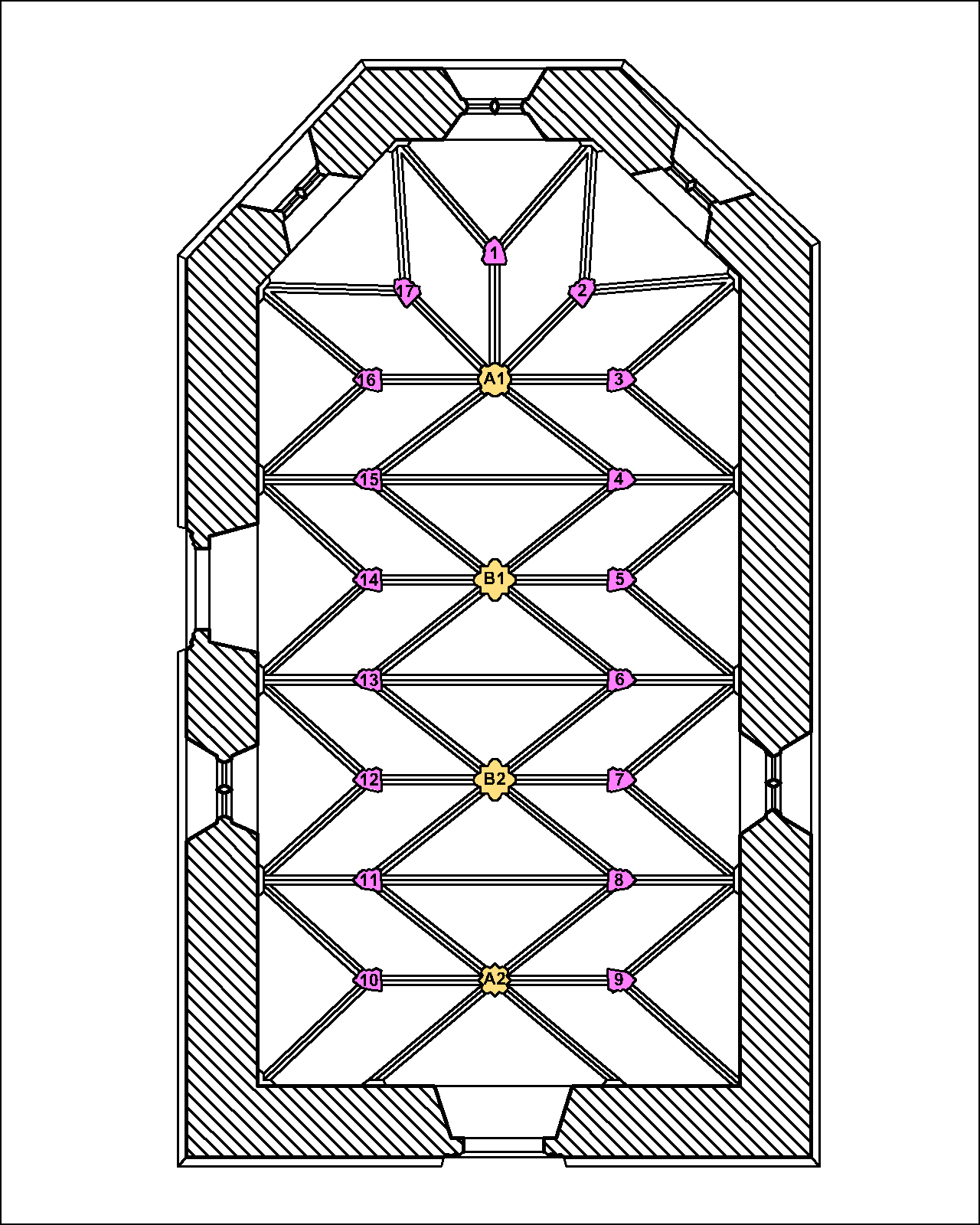 Kaple svatého Jiří v Litovli. Schéma svorníků a kolčích štítků na klenbě kaple. Svorníky s reliéfním znakem A1 erb pánů z Vlašimi A2 znak města Litovle Svorníky s malovanými motivy B1 Svatá Kateřina B2 Archanděl Michael Kolčí štítky 1 Veraikon 2 Král David 3 neidentifikovaný světec 4 neidentifikovaný světec 5 svatý Ondřej 6 moravský znak 7 erb Kostků z Postupic 8 erb Matyáše Korvína 9 znak Dolní Lužice 10 znak města Brna 11 Slezský znak 12 erb pánů z Boskovic 13 znak města Litovle 14 snad svatý Juda Tadeáš 15 snad Ester 16 svatý Pavel 17 svatý Petr Podle: LIPENSKÁ, Kristina. Kaple sv. Jiří v Litovli: forma, výzdoba a funkce. Brno, 2016